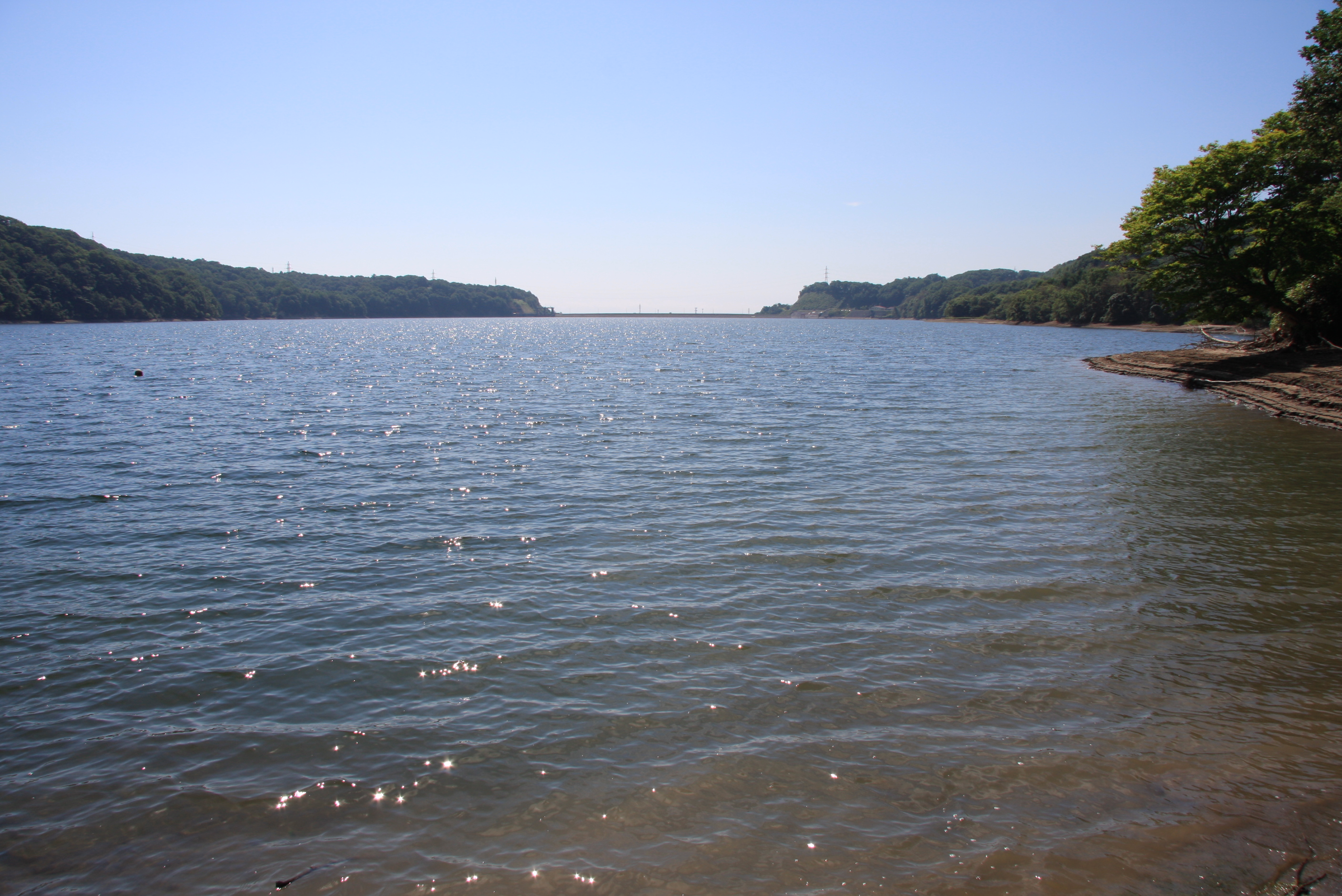 室蘭工業用水池「不盡の湖」 幌別ダム人造湖